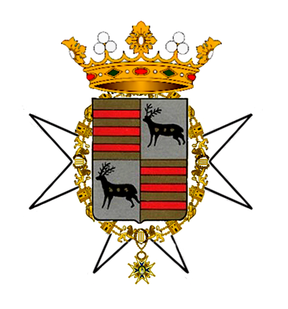 Cuartelado, primero y cuarto de oro con tres fajas de gules, y segundo y tercero de plata, con un ciervo andante, de su color cargado de tres estrellas de oro de seis puntas. Collar de la Orden de Carlos III y Cruz de la Orden de Malta.